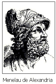 Menelau